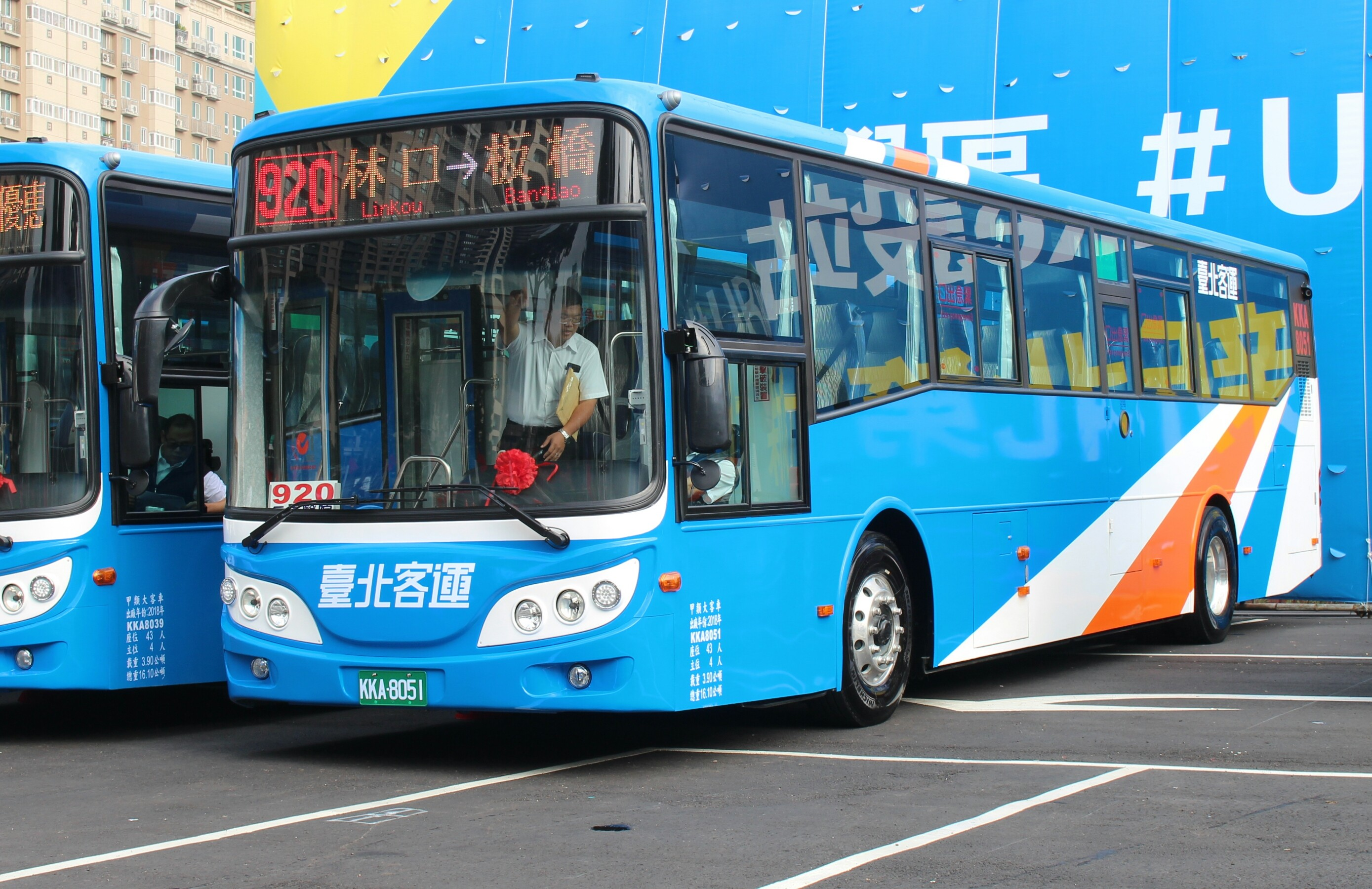 臺北客運2018年Fuso RM11FN2XE大客車KKA-8051行駛920線。